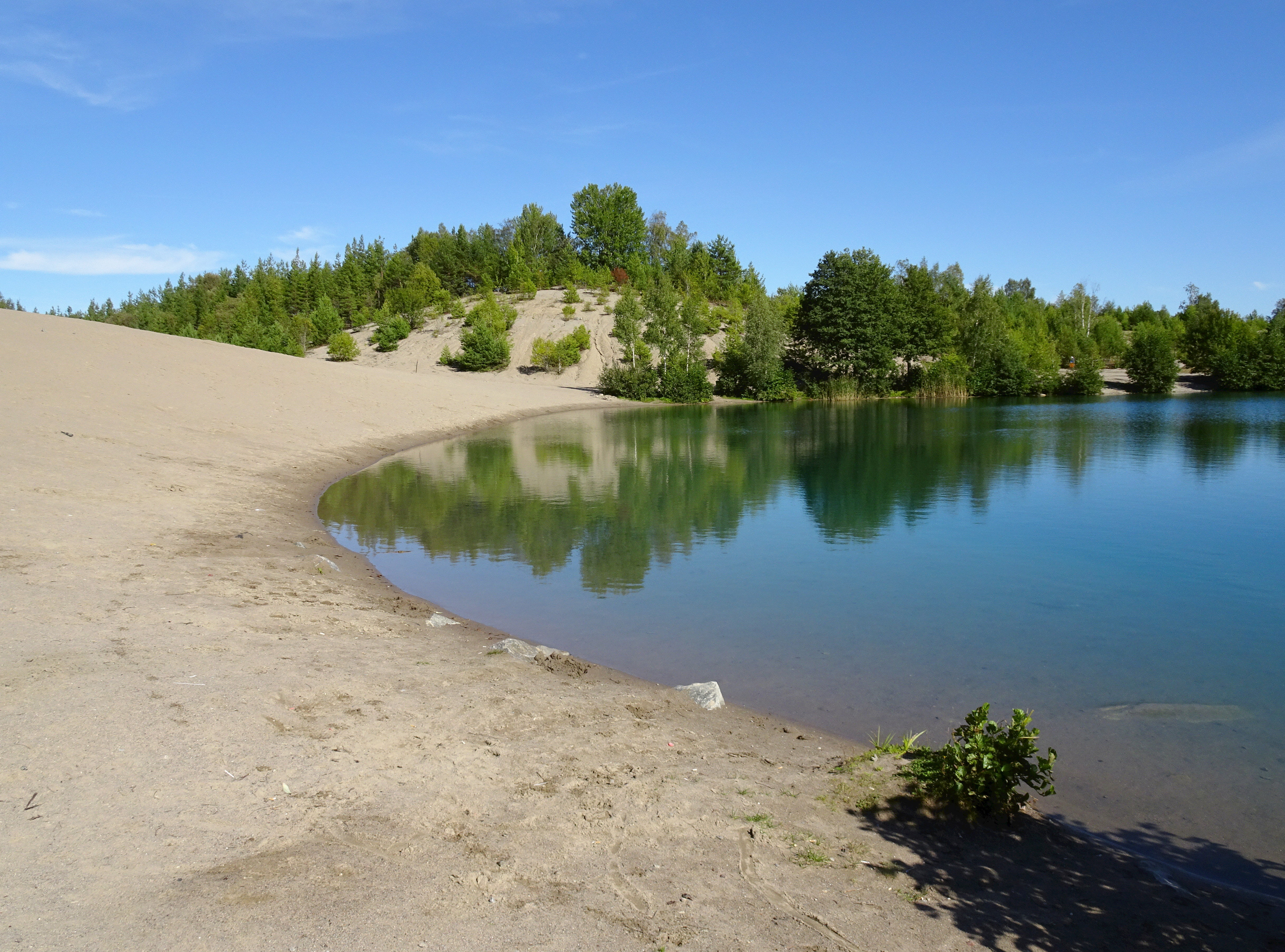 Blå lagunen på Munsön, Ekerö kommun, tidigare grustäkt